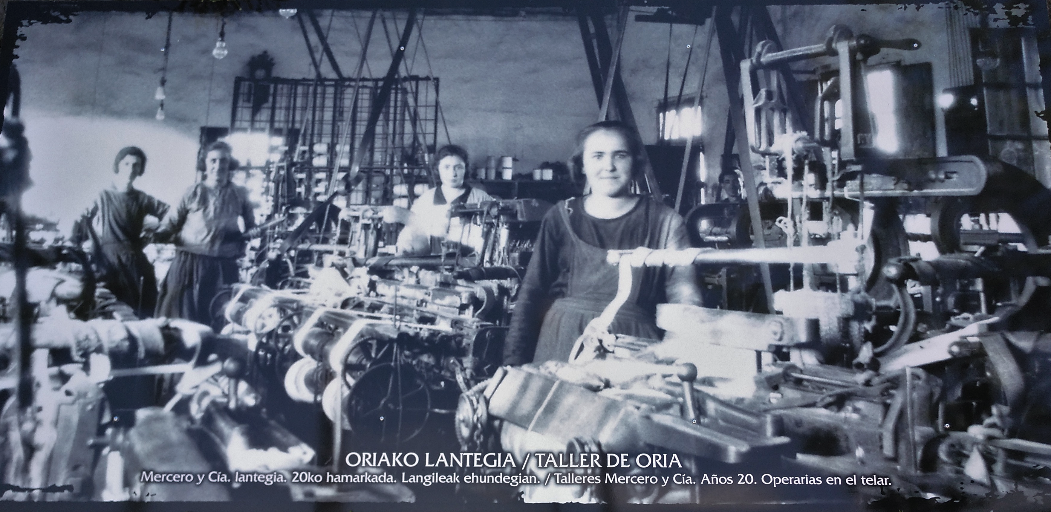 ORIAKO LANTEGIA. Mercero y Cía. lantegia. 20ko hamarkada. Langileak ehundegian